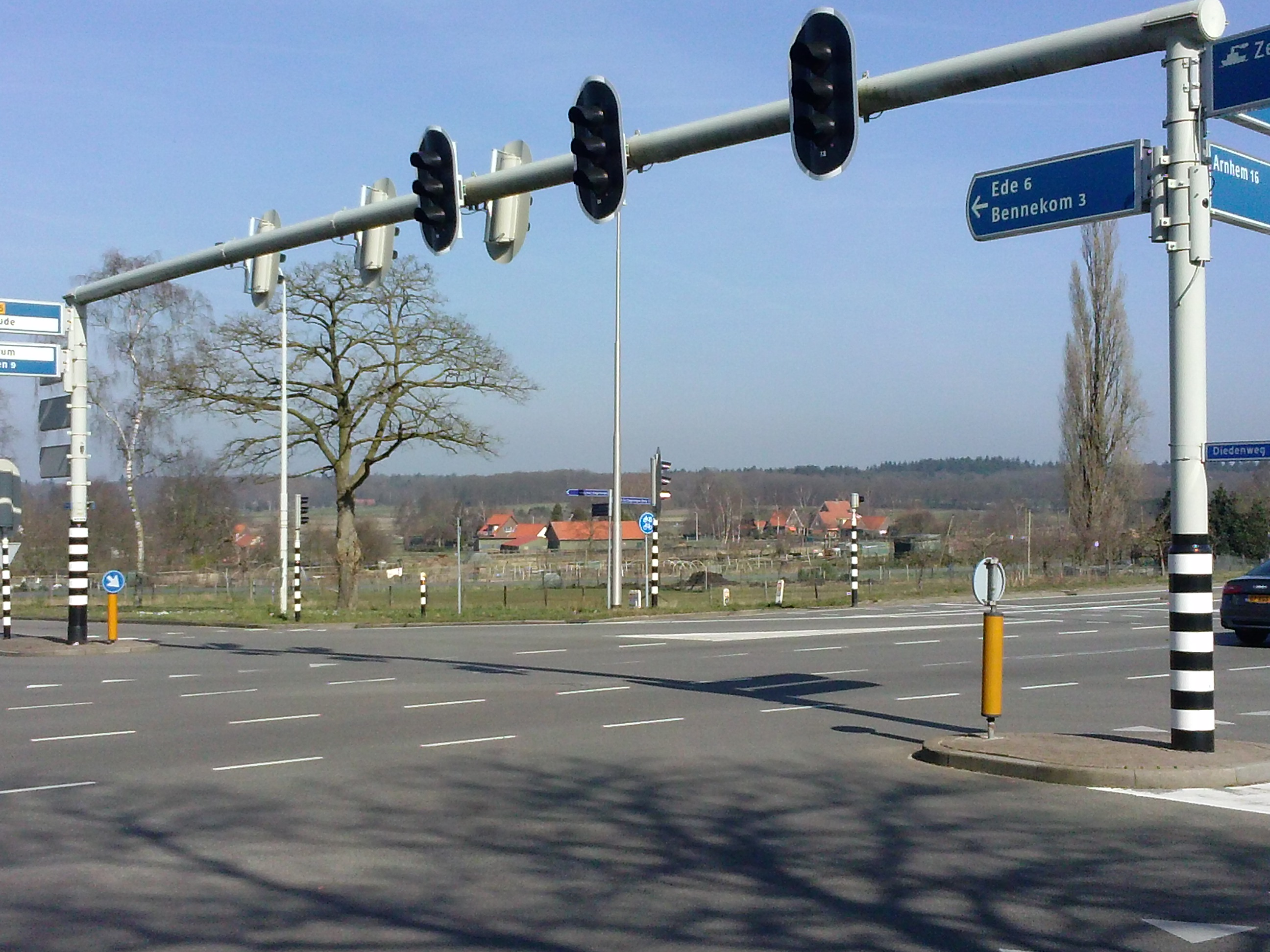 Wageningse Eng gezien vanaf kruising Diedenweg/Ritzema Bosweg